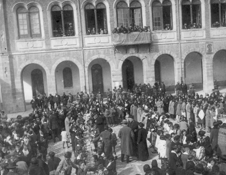 Ayuntamiento - Tiedra (Valladolid) - Fotografía B/N